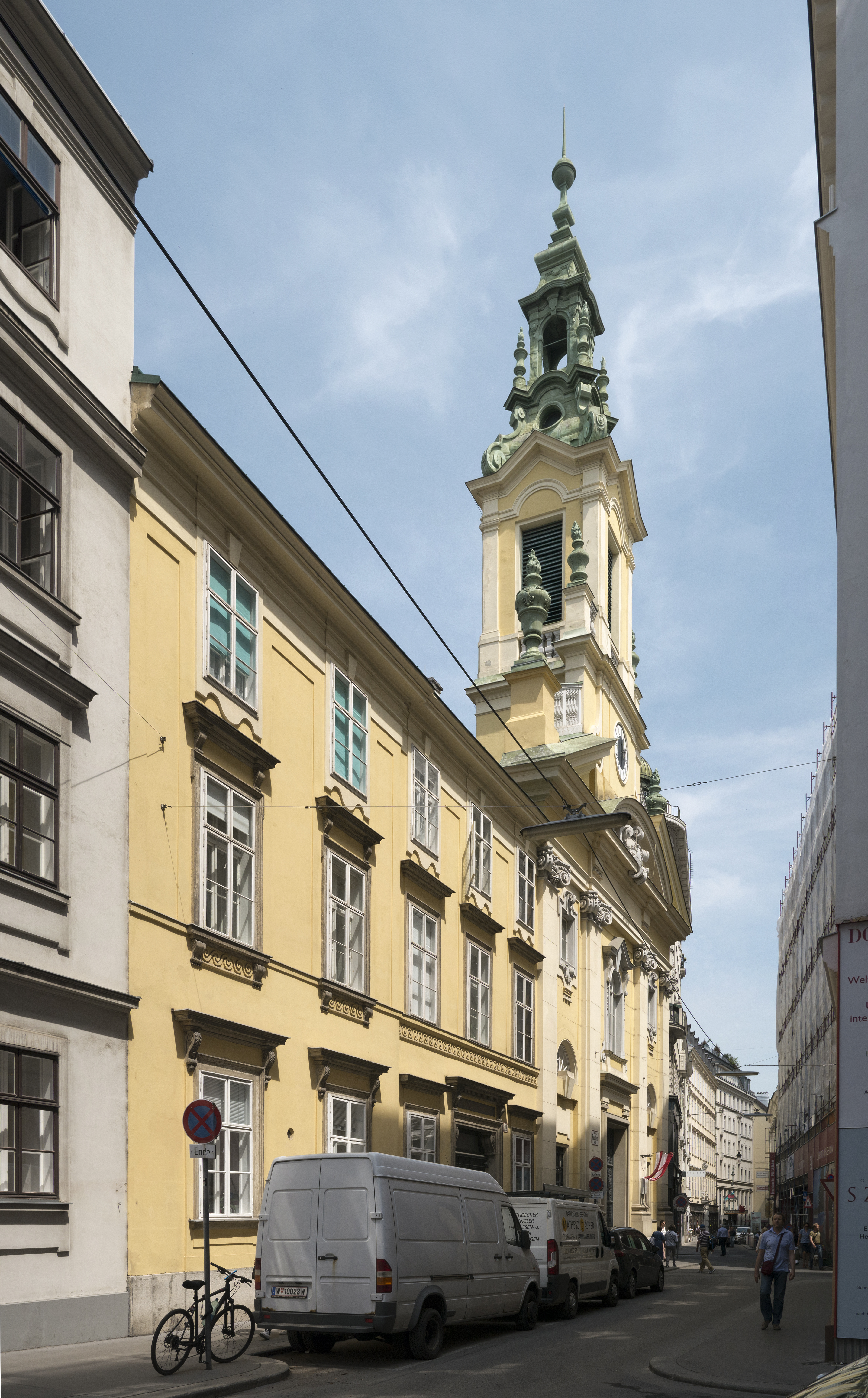 Dorotheergasse evang. Kirche